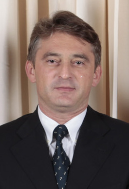 Желько Комшич